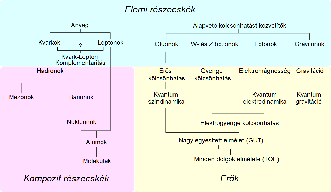 Részecske áttekintés